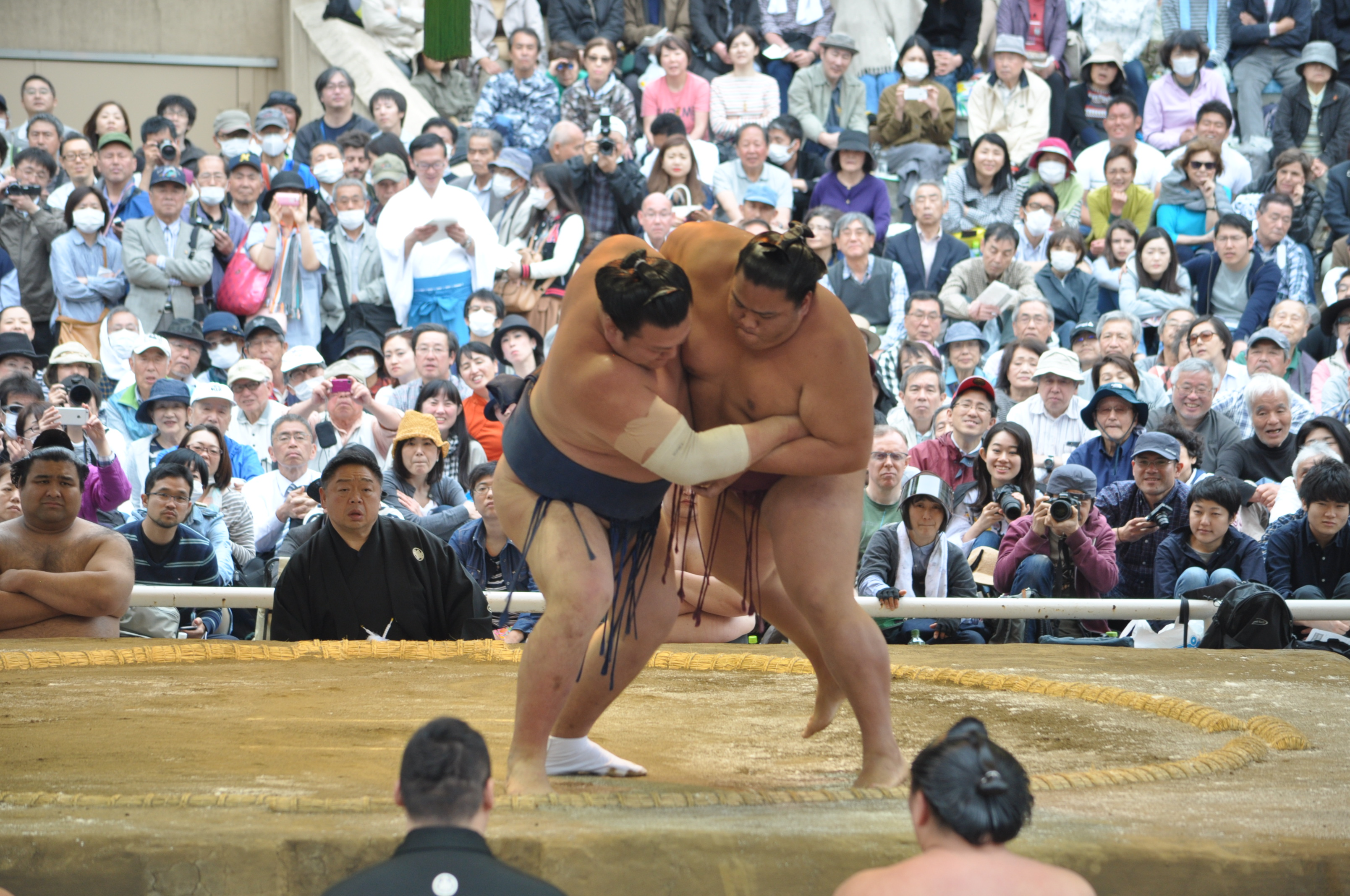 御嶽海 久司